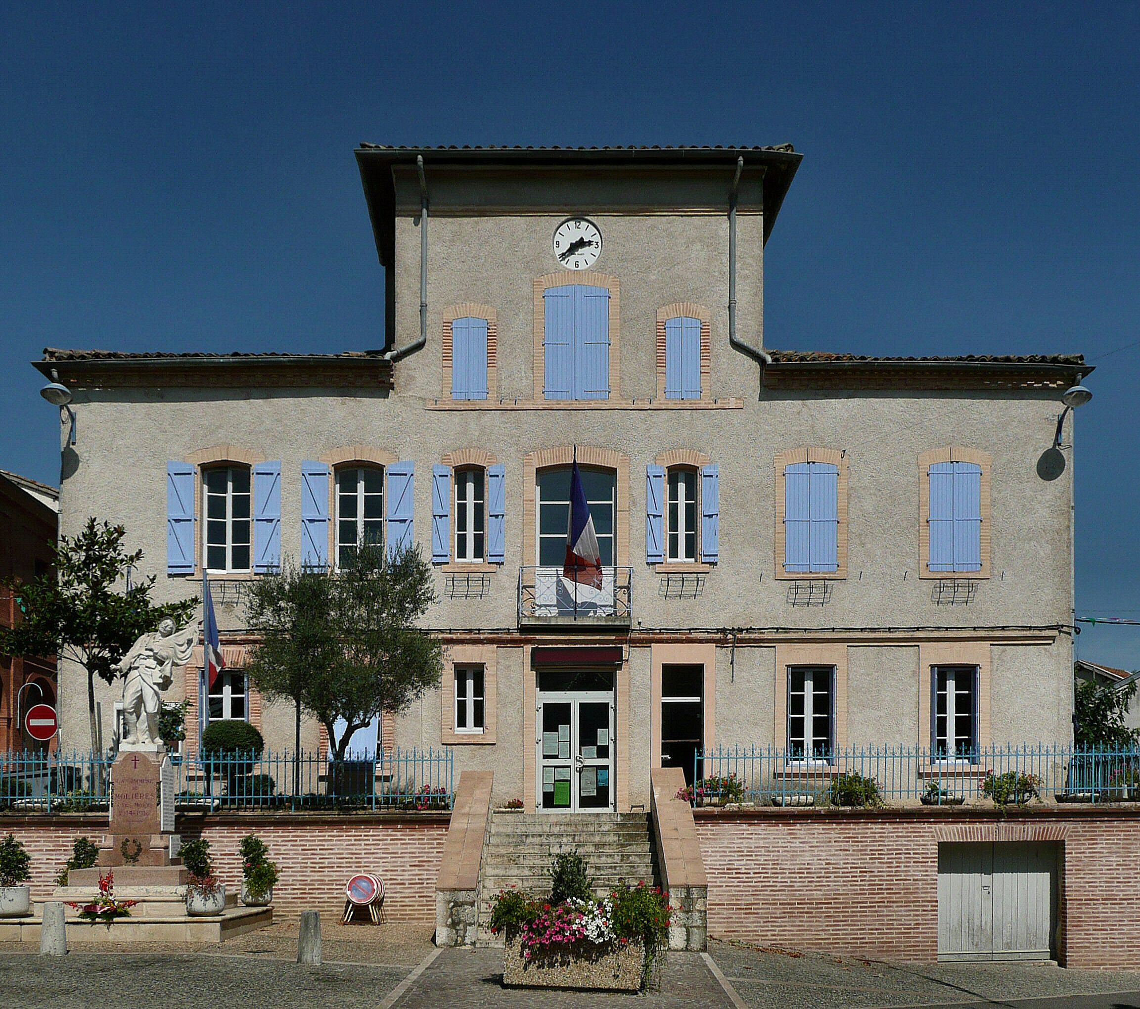 Mairie de Molières (Tarn-et-Garonne)